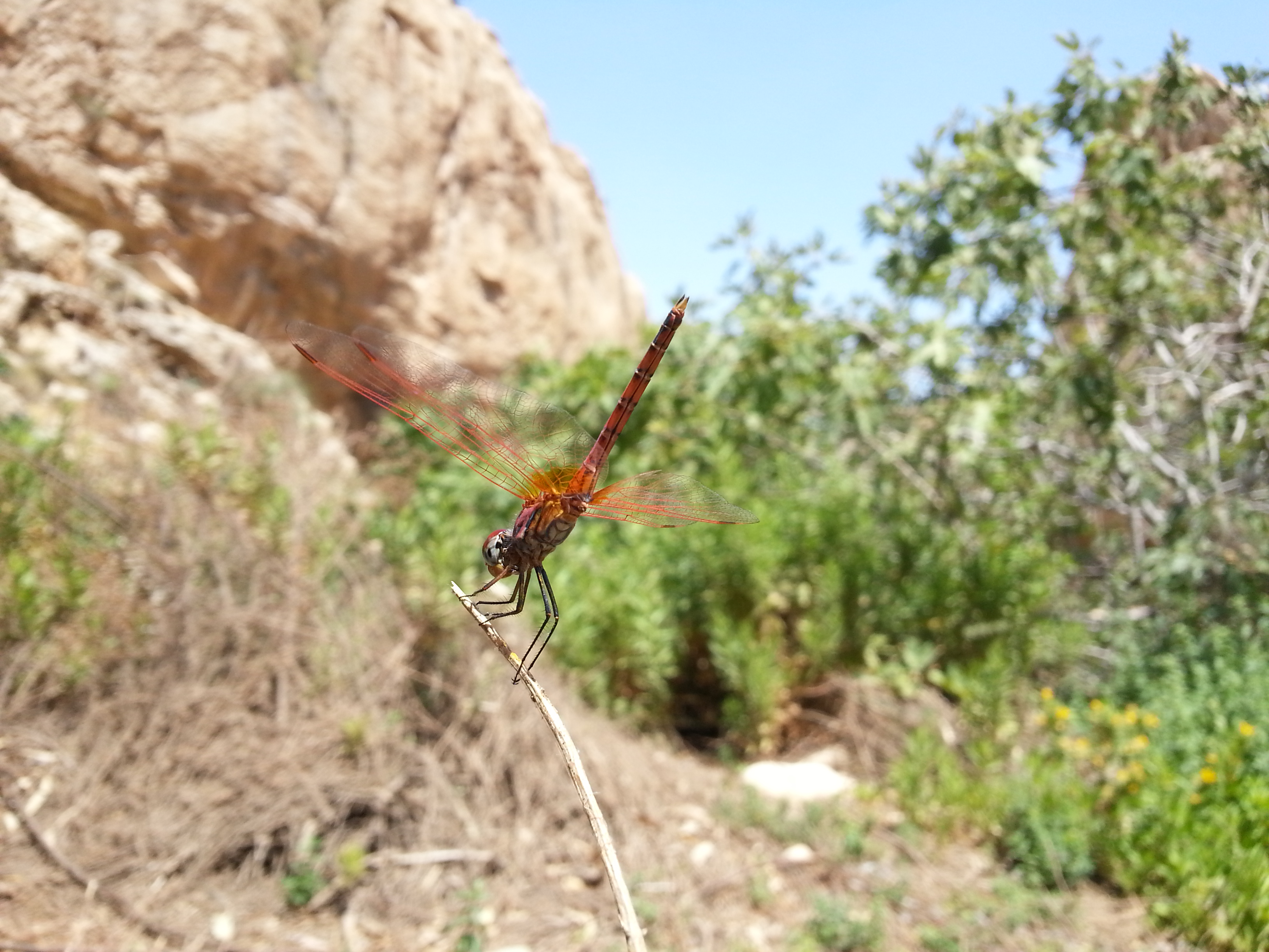 שפירית אדומה בנחל פרת